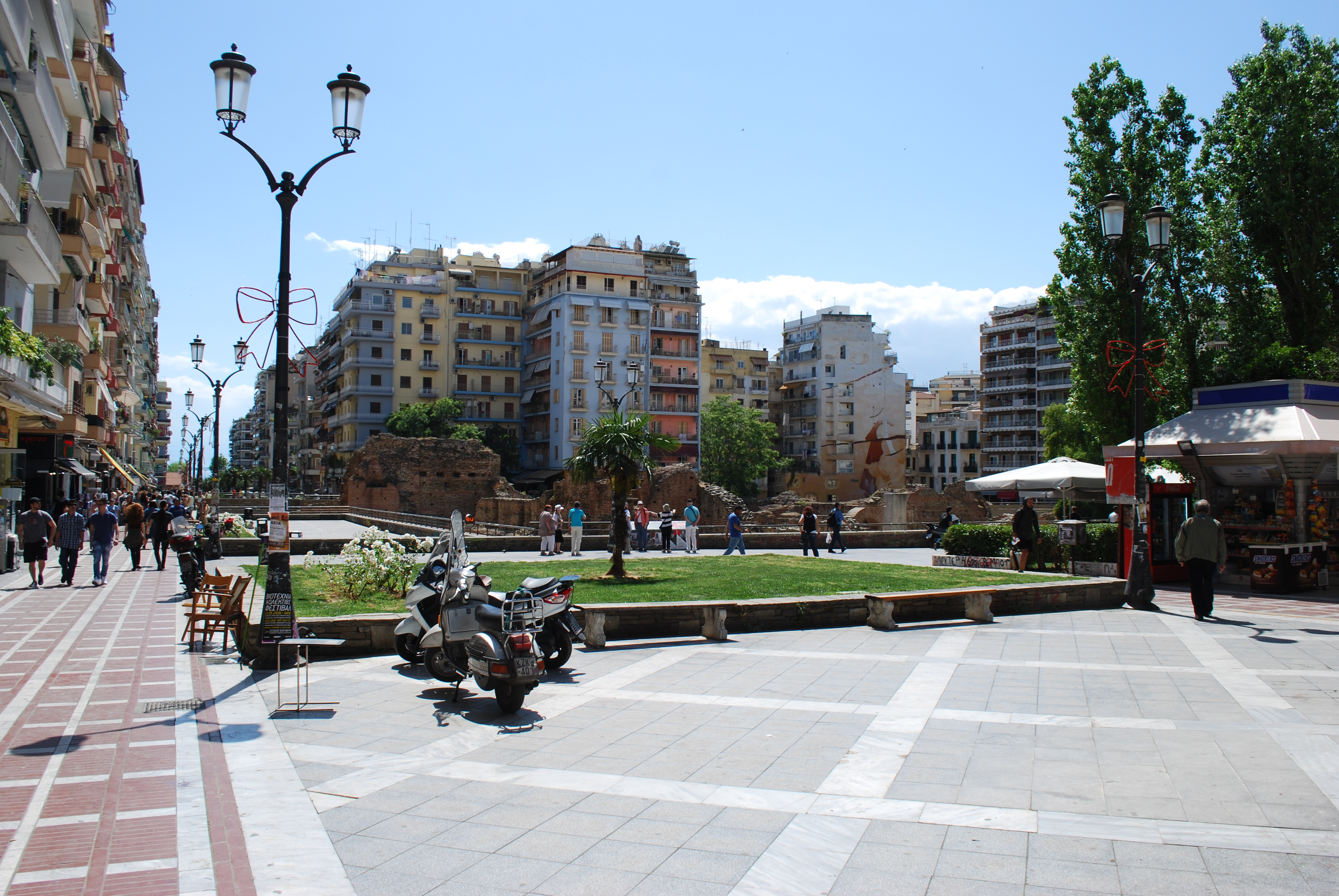 Vue de Thessalonique.